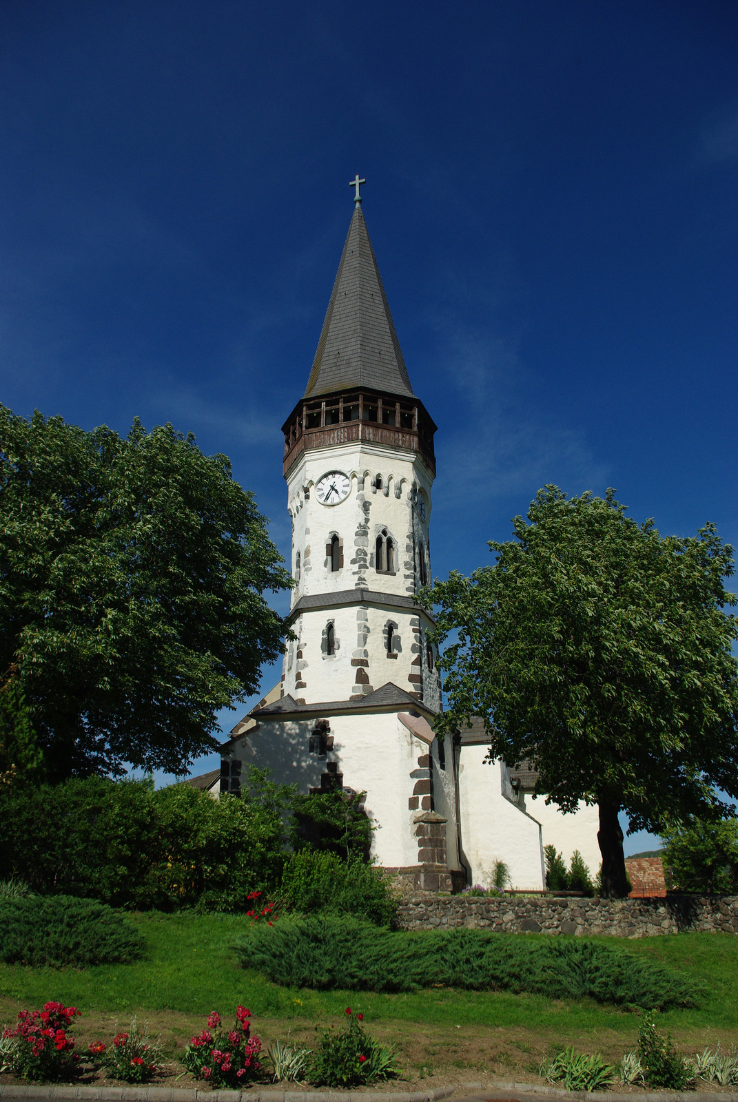 R. k. templom (Kisbodolgasszony) (Gyöngyöspata, Kossuth u.) This is a photo of a monument in Hungary. Identifier: 5725